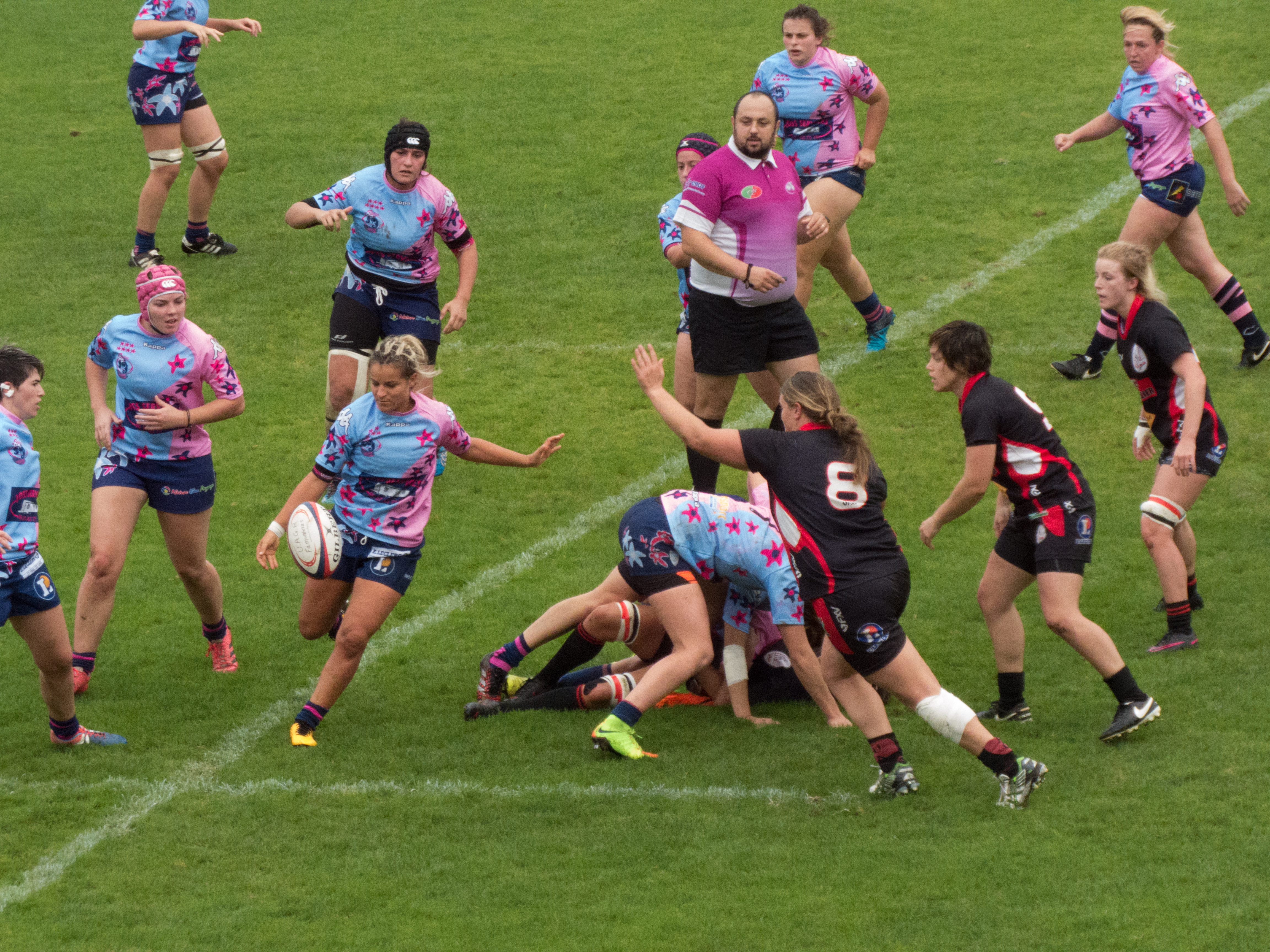 Q46998098 — 22 October 2017, stade Maurice-Boyau. Match between: Pachys de l'US Dax — Union athlétique gaillacoise